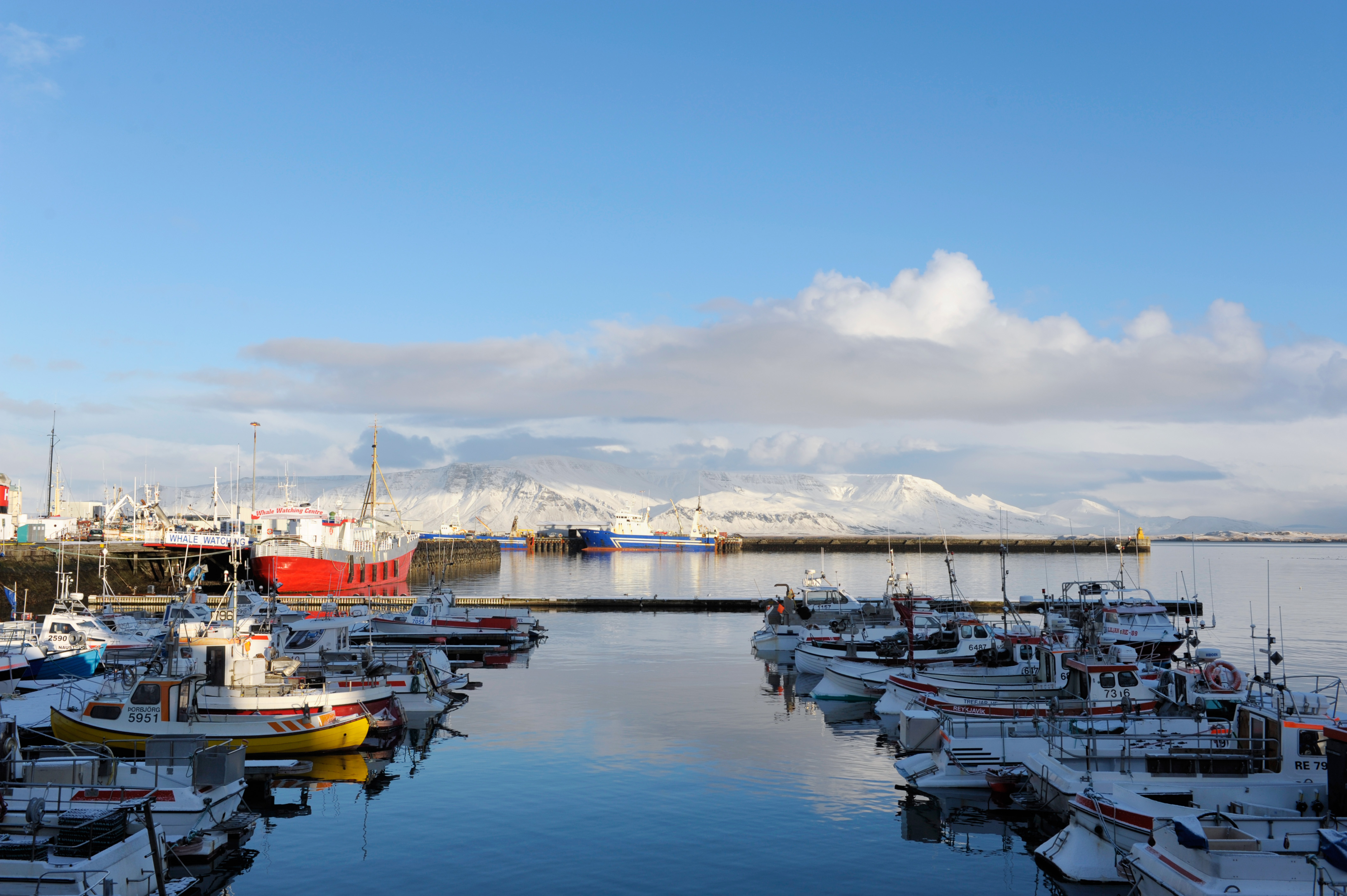 Fiskebåtar i Reykjavik 2009-01-27